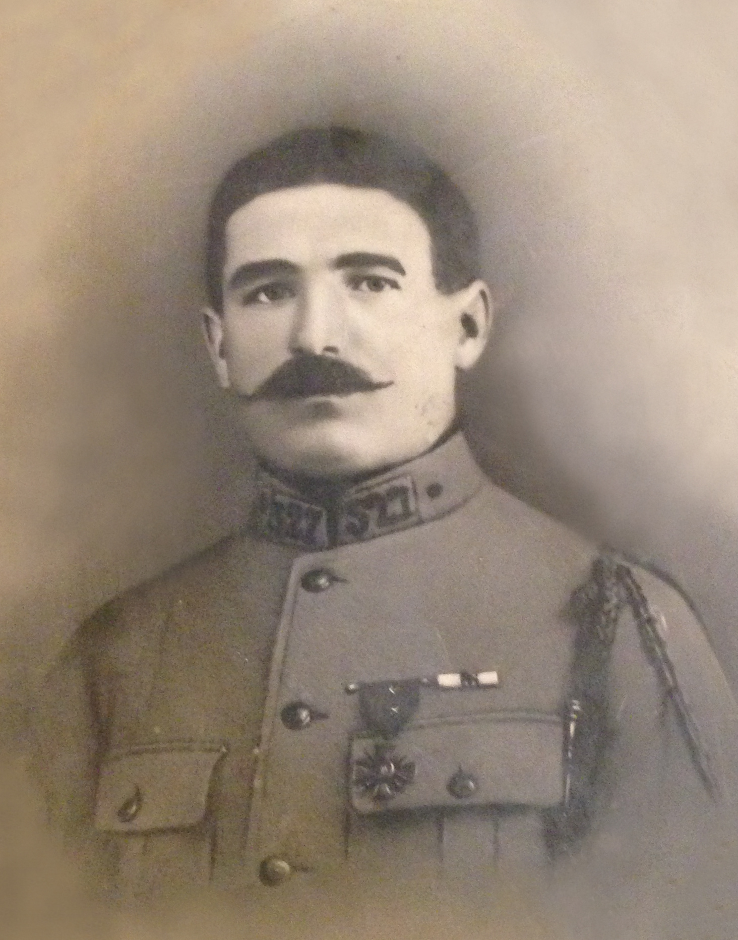 Portrait d'Eugène Bouvier, décoré de la croix de guerre 14-18, dans son uniforme du 327 ème Régiment d' Infanterie.